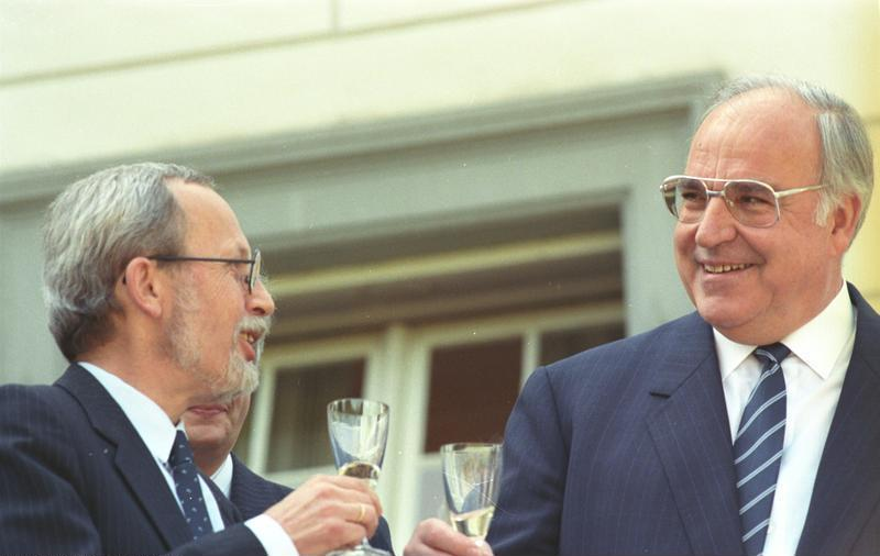 18.9.90/BRD:Staatsvertrag Auf die Unterzeichnung des Staatsvertrages zwischen der BRD und der DDR über die Wirtschaft-, Währungs- und Sozialunion stießen DDR- Ministerpräsident Lothar de Maiziere (l) und Bundeskanzler Helmut Kohl (r) mit einem Glas Sekt an. ADN/Settnik